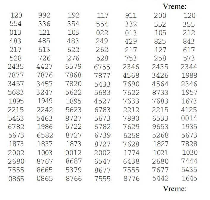 s